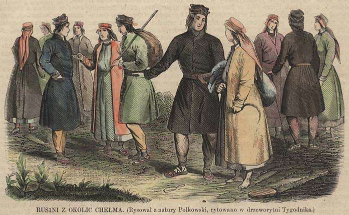 Russinische Bevölkerung auf dem Gebiet des ehemaligen Polen-Litauen, Russinen aus Chelm, Ostpolen, Lithografie von 1861.